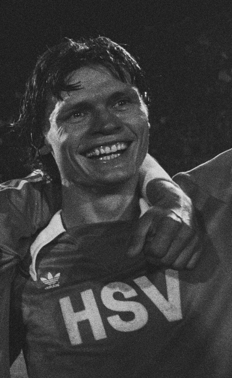 Collectie / Archief : Fotocollectie Anefo Reportage / Serie : [ onbekend ] Beschrijving : Anderlecht tegen HSV (finale Europa Cup II ); vreugde bij HSV na afloop Datum : 11 mei 1977 Locatie : Amsterdam Trefwoorden : sport, voetbal Fotograaf : Peters, Hans / Anefo Auteursrechthebbende : Nationaal Archief Materiaalsoort : Negatief (zwart/wit) Nummer archiefinventaris : bekijk toegang 2.24.01.05 Bestanddeelnummer : 929-1737